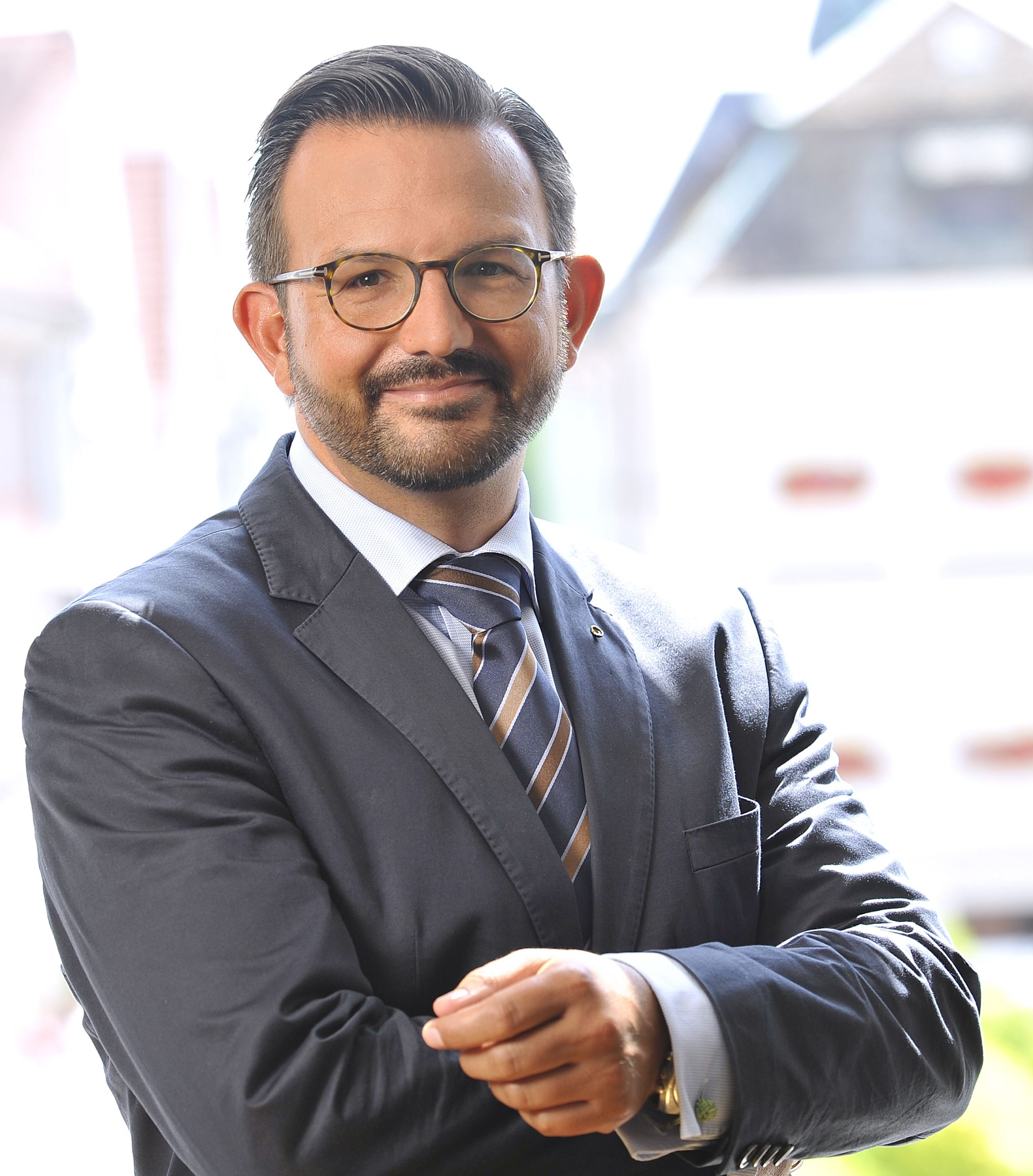 Christian Lübbers (geb. 1977) ; Facharzt für Hals-Nasen-Ohren-Heilkunde und Homöopathiekritiker